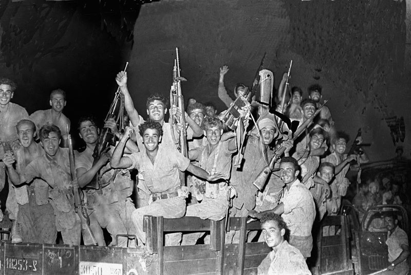 פעולות-תגמול, פשיטת לילה בחאן-יונס, מבצע "אלקיים", חיילים מריעים על משאית, גדוד 890, ראשון מימין למטה, מפקד המחלקה בפלוגה ה', דורי שגיא, במרכז, סביצקי, שני משמאל שורה עליוני, דודיק רותנברג.